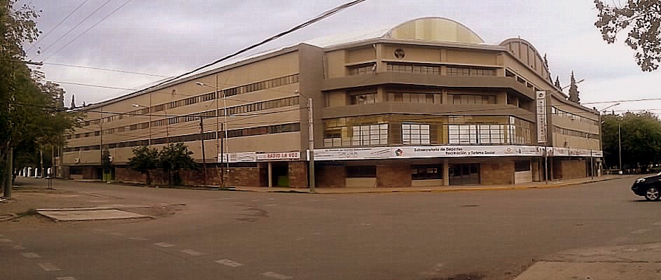 Estadio Aldo Cantoni. San Juan, Argentina.